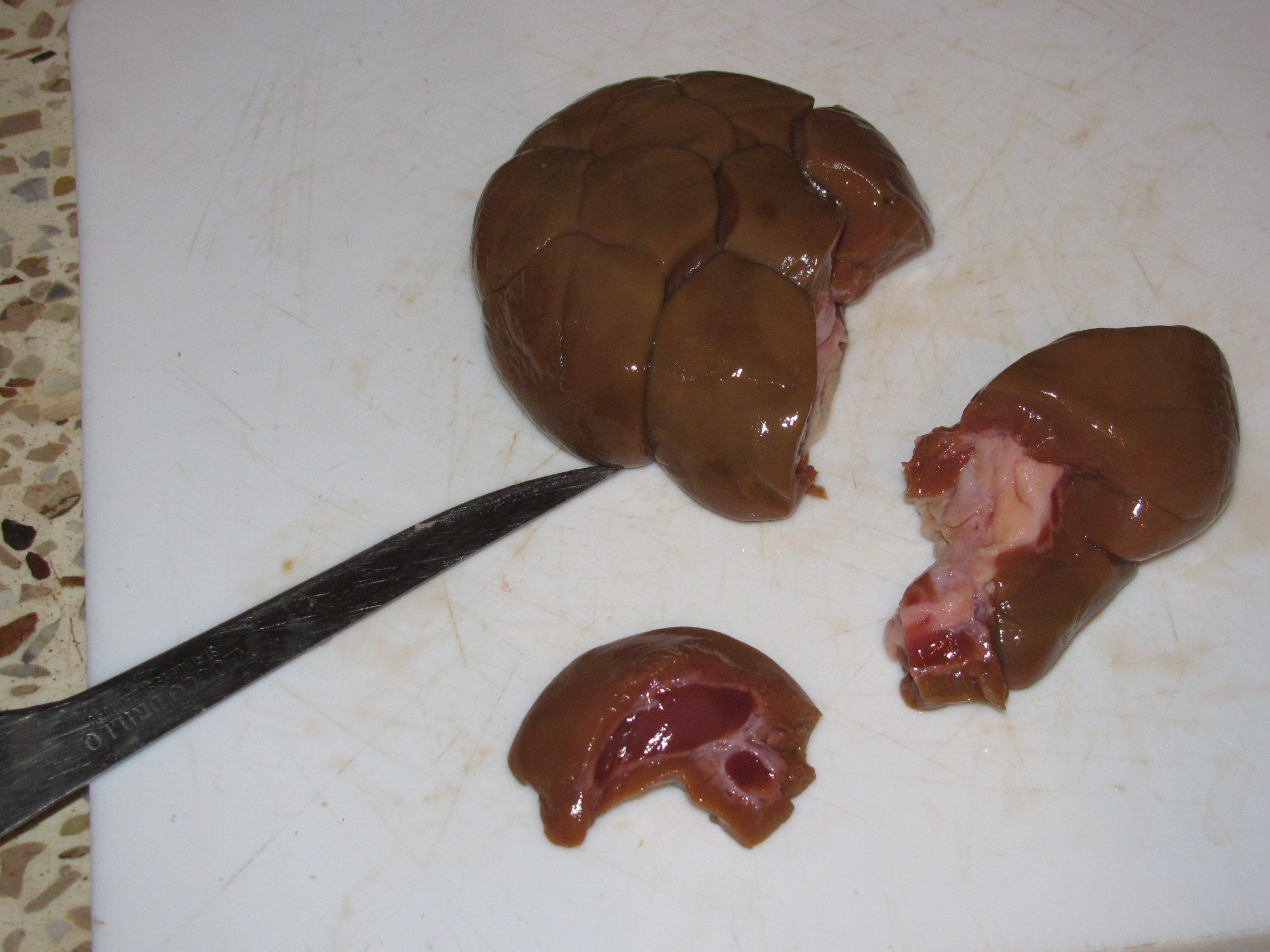 Лівер. нирки яловичі